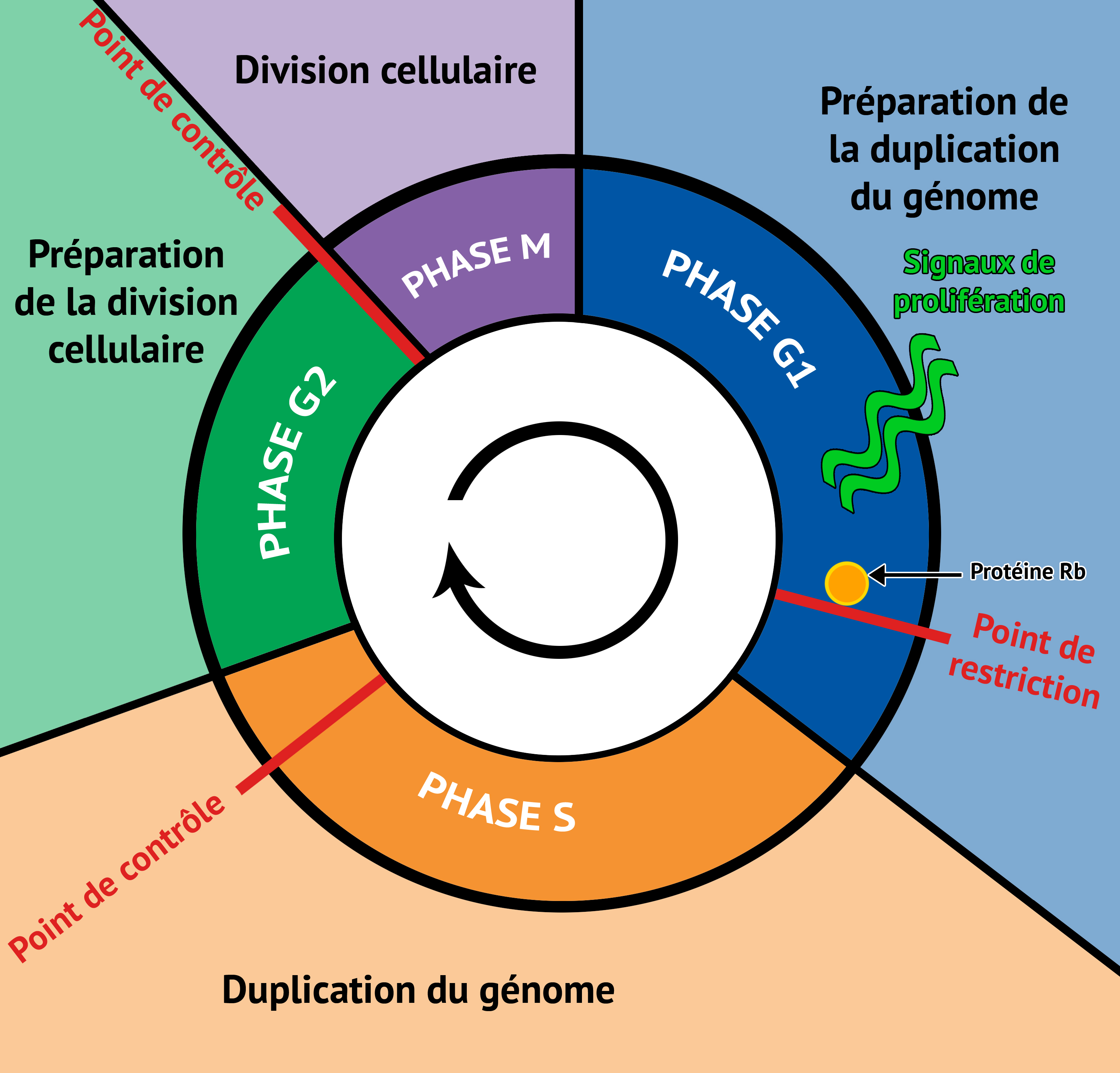 Schéma récapitulatif des principales phases du cycle cellulaire